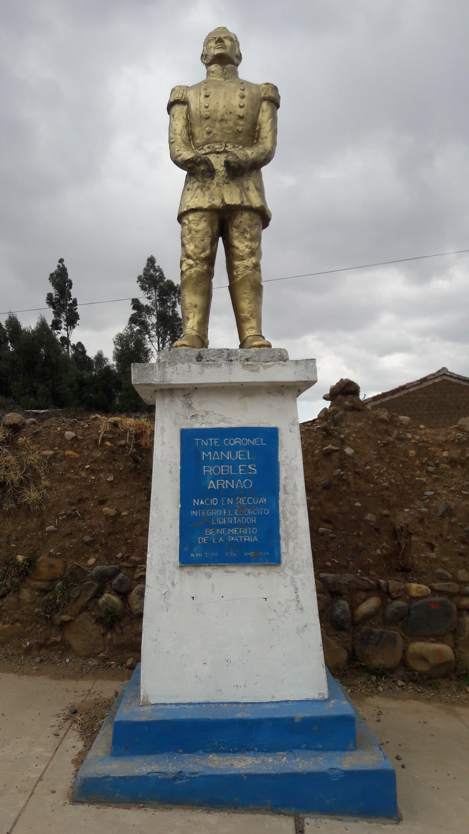 Tne. Coronel Manuel Robles Arnao: Nacio en Recuay, integro el Ejercito Libertador Benemérito de la Patria.